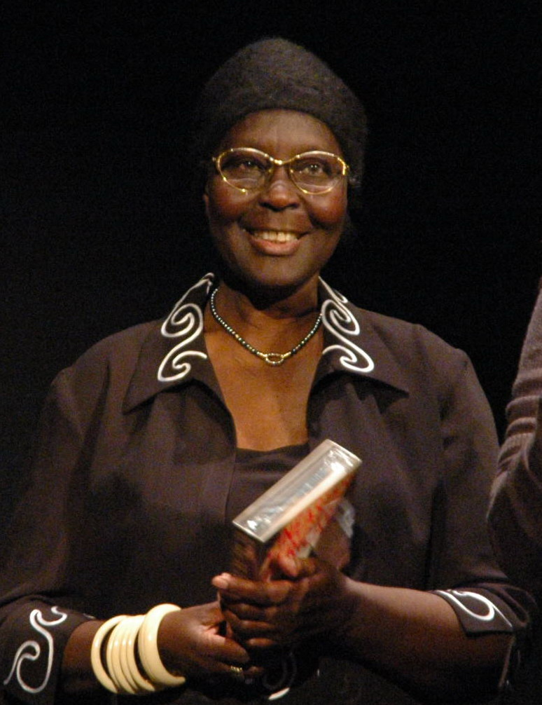 Mbissine Thérèse Diop, lors d'une soirée d'hommage à Ousmane Sembène à la Cinémathèque française le 18 février 2008